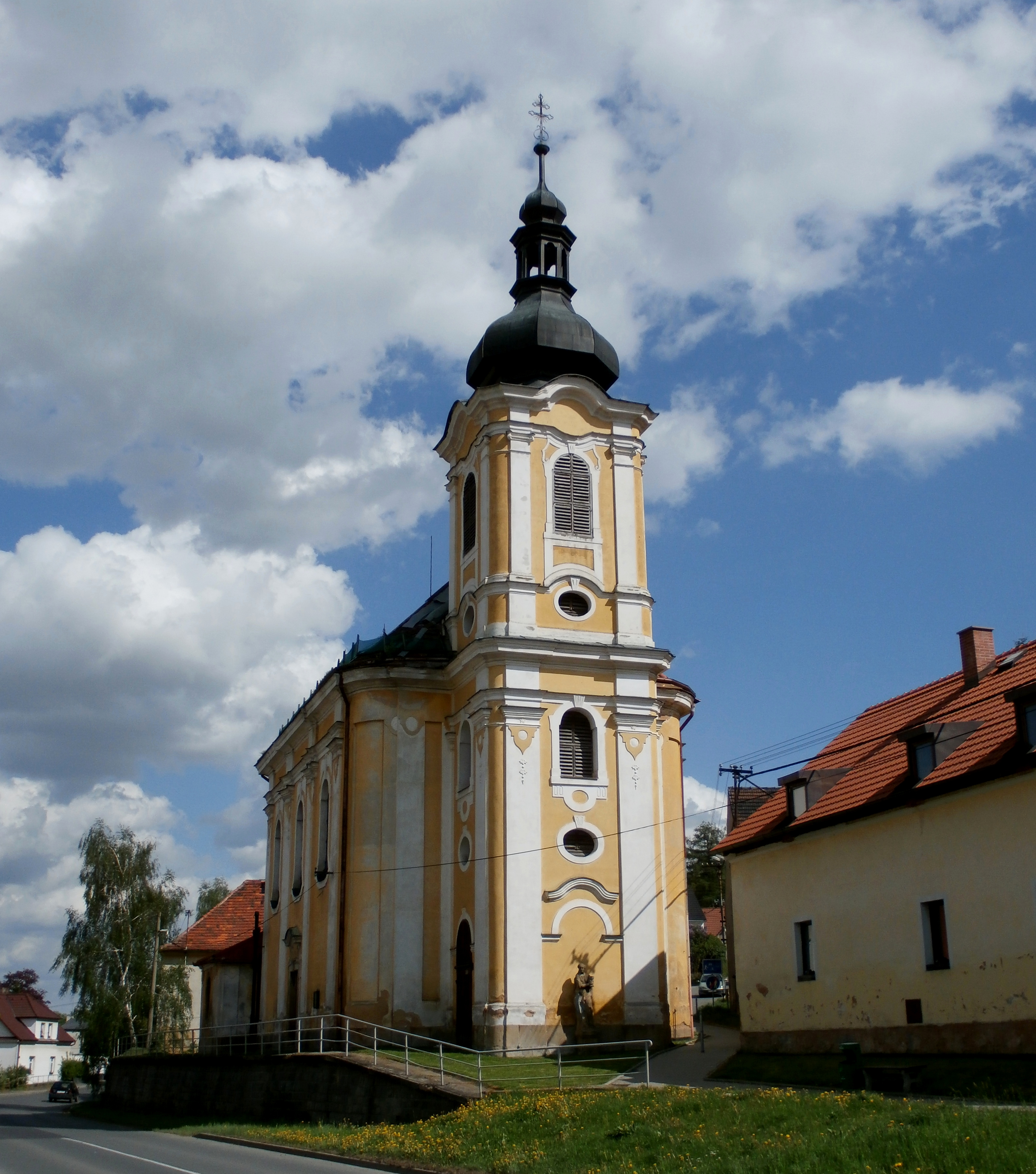 Kostel svatého Štěpána v Kozolupech.